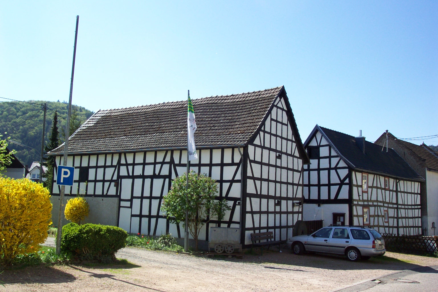 Heimatmuseum, Niederbreitbach